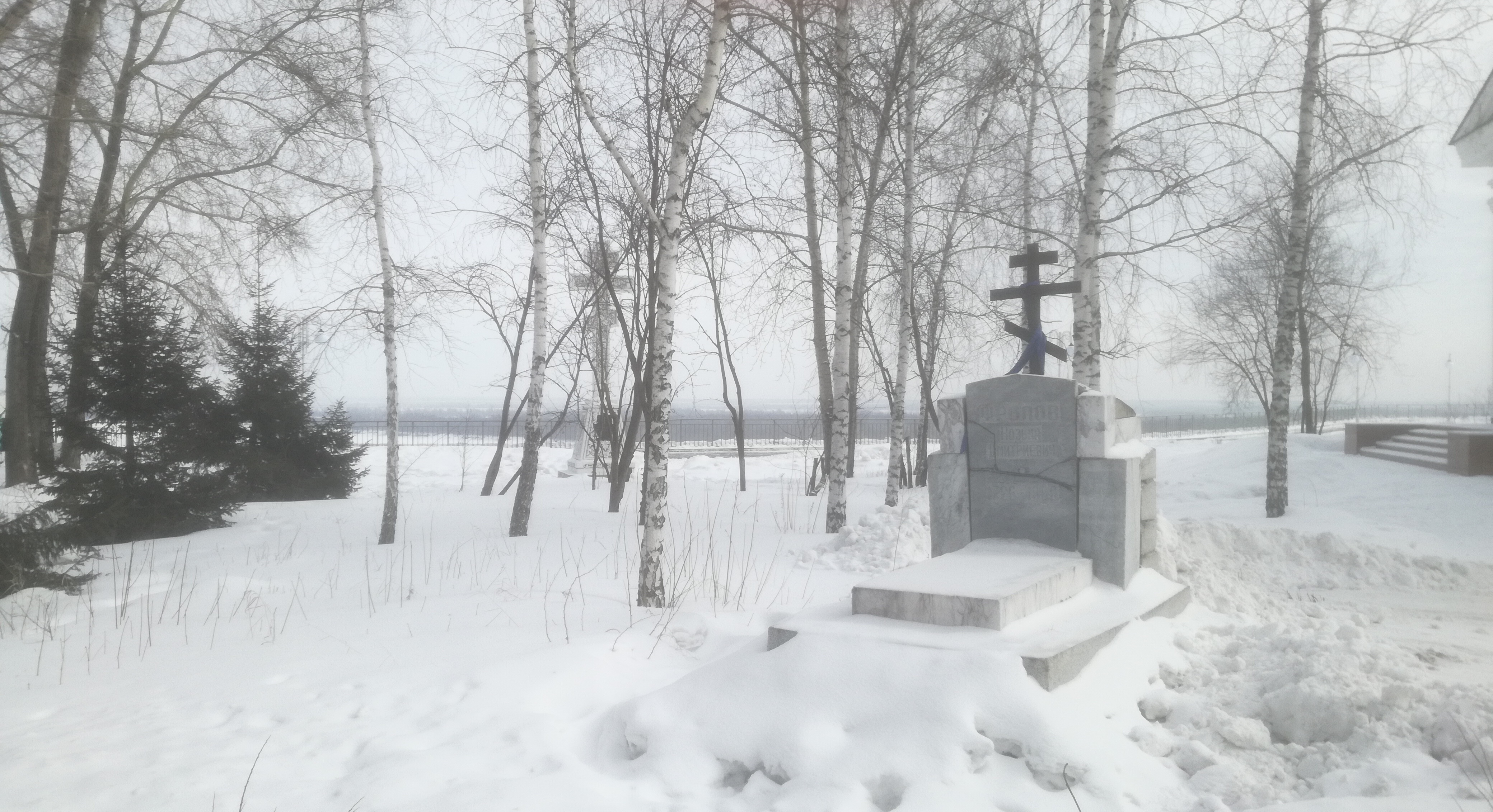 Нагорный парк в Барнауле